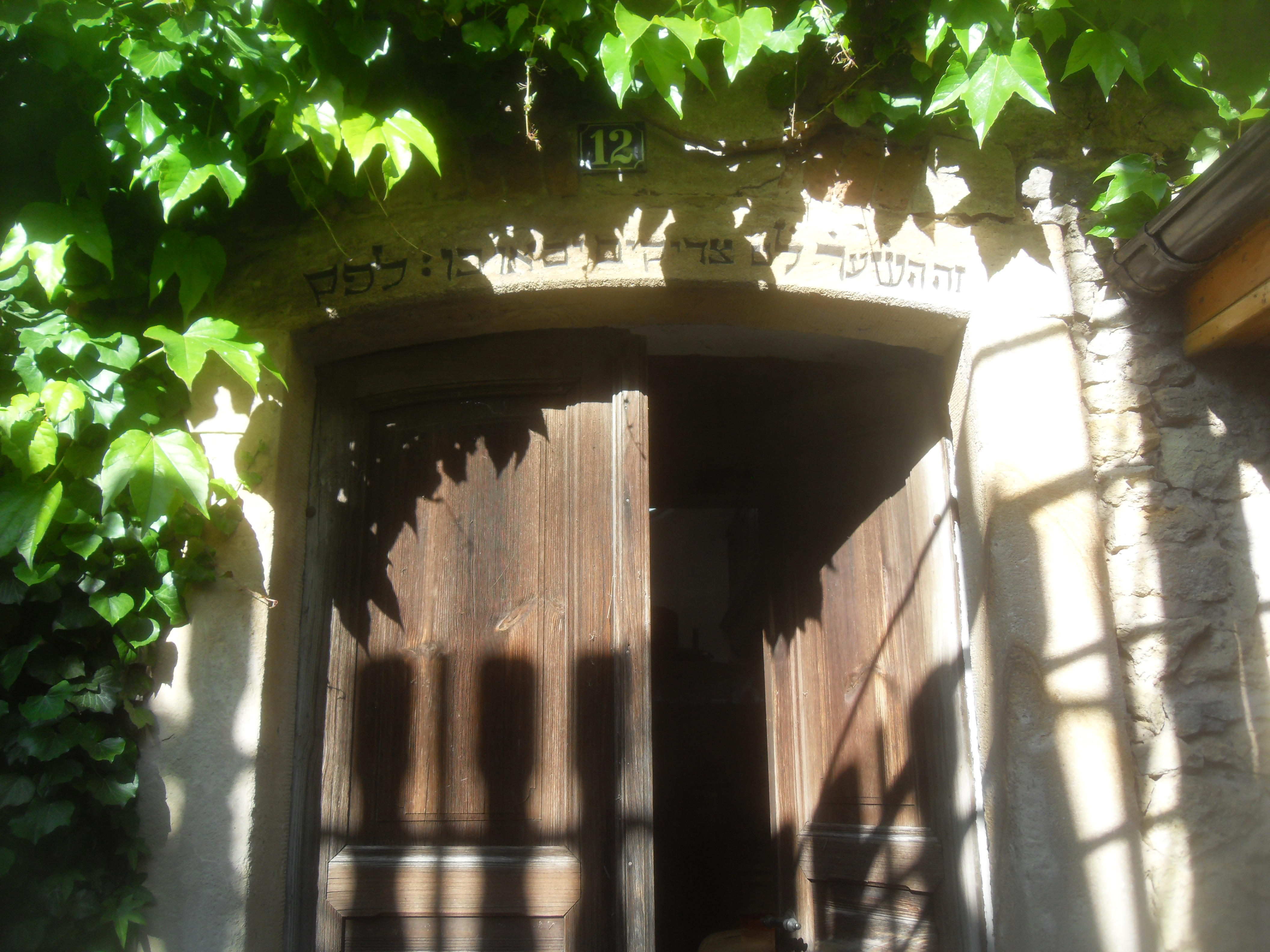 Eingang zur ehemaligen Synagoge in Guntersblum in Rheinhessen in Rheinland-Pfalz (Deutschland). Über dem Eingang steht aus dem Hebräischen ins Deutsche übersetzt: „Dies ist das Tor zum Ewigen, Gerechte werden dort eintreten.“ (Psalm 118, 20). Zudem enthält die Inschrift die Jahreszahl 1770.